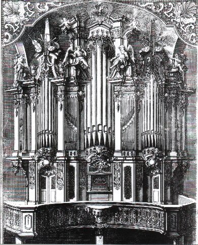 Kupferstich der Orgel von Gottfried Silbermann (1742) in der Johanneskirche Zittau, Sachsen